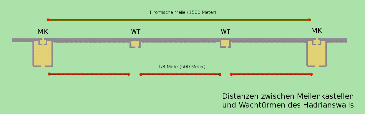 Abstände zwischen Meilenkastellen und Wachtürmen am Hadrianswall.